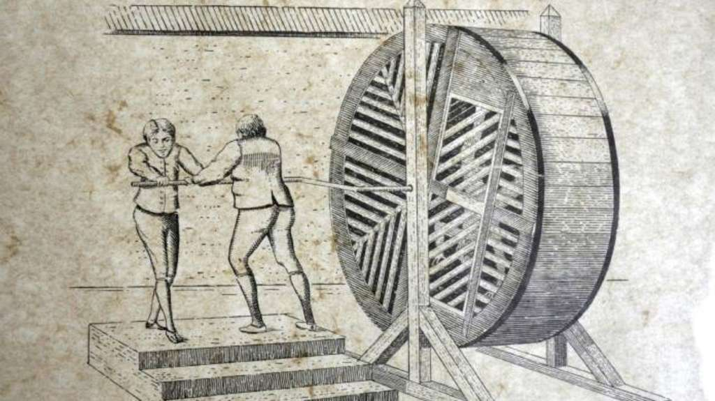 Die Abbildung zeigt ein "Hohles Rad", wie es um 1824 in psychiatrischen Anstalten gebräuchlich war. Schneider, P. J.: Entwurf zu einer Heilmittellehre gegen psychische Krankheiten. Tübingen 1824